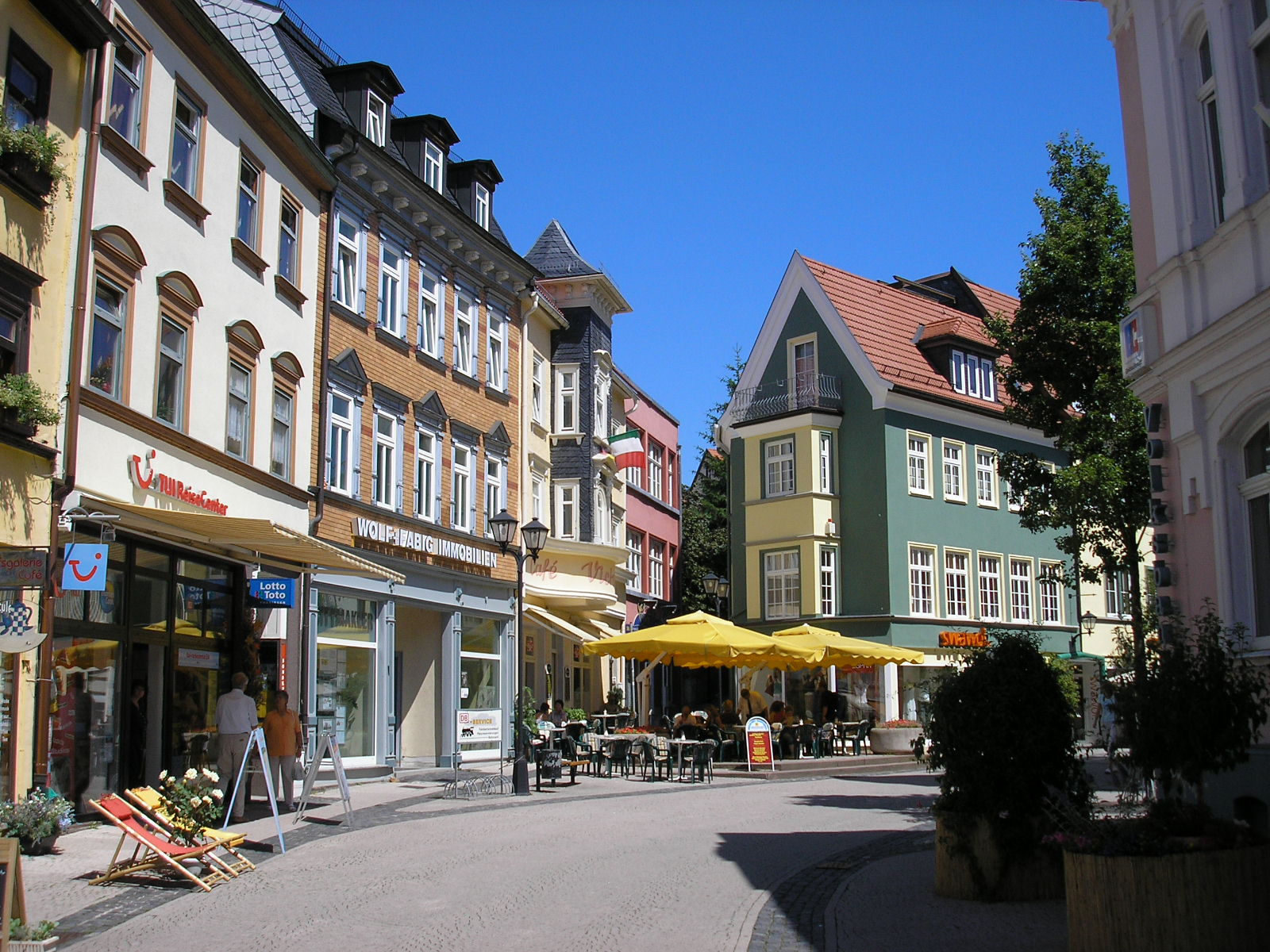 In der Ilmenauer Fußgängerzone. Quelle: selbst fotografiert